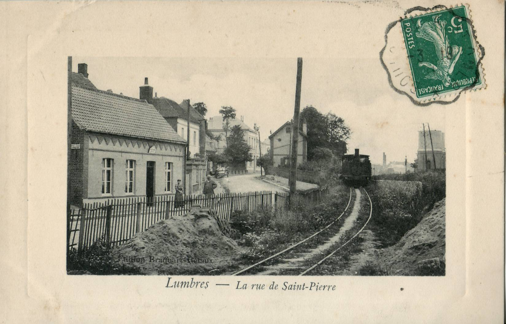 Carte postale ancienne éditée par Braquart-Trétaux :LUMBRES - La rue de Saint-Pierre.Vue d'une rame du chemin de fer d'Anvin à Calais